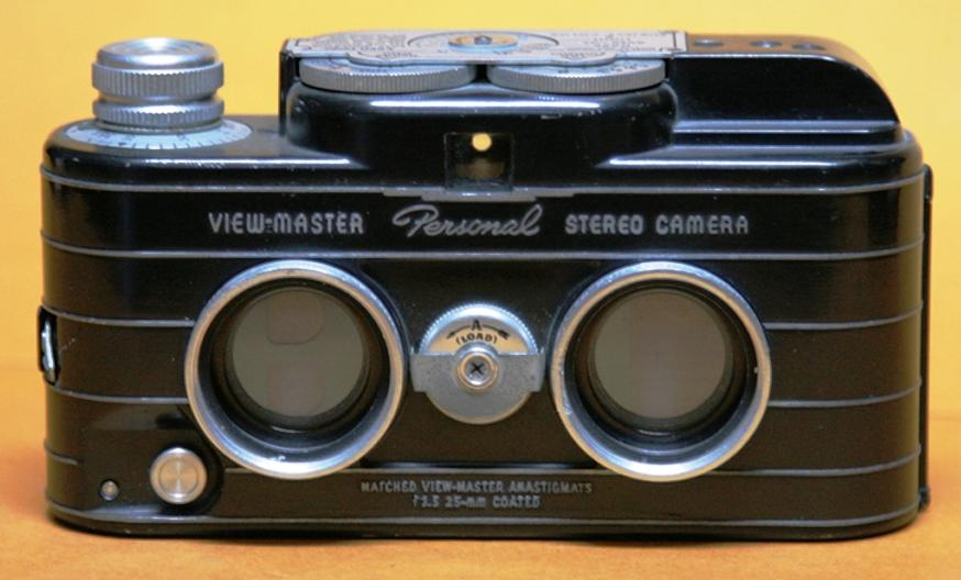 Fotocamera View-Master Personal del 1952 dalla collezione Marcè CL